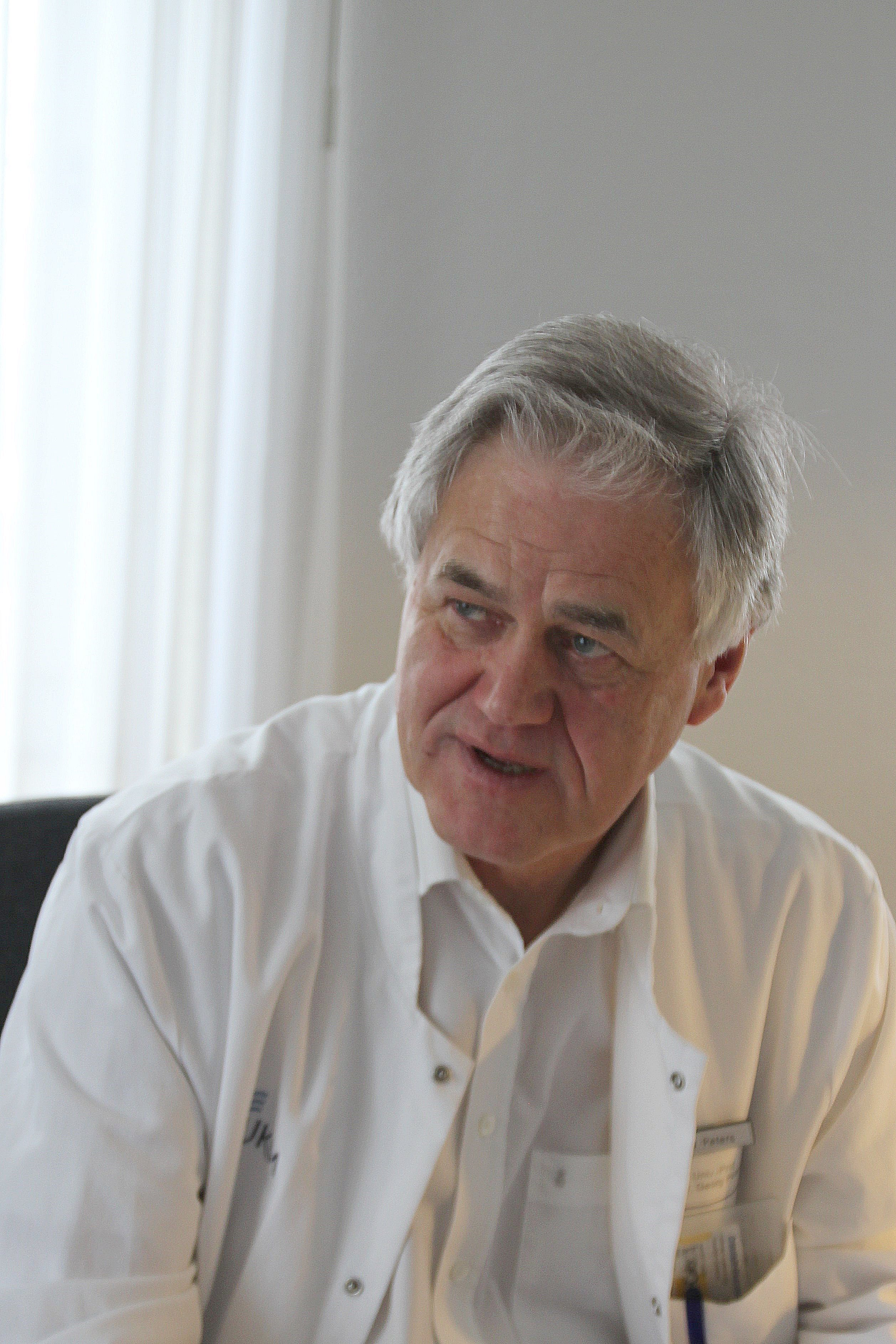 Prof. Dr. Geoerg Peters, Universität Münster, 2014